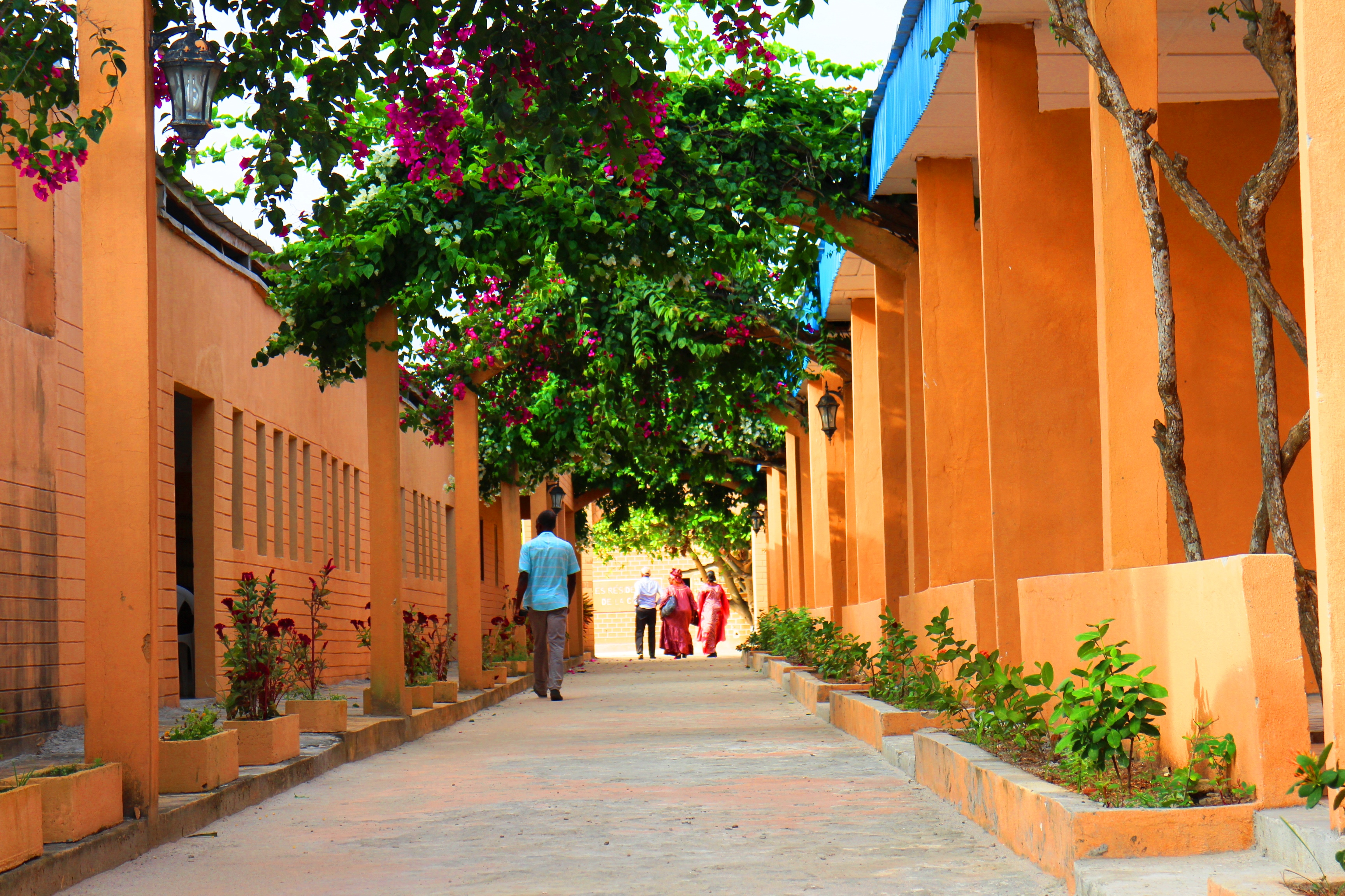 allée dans la sablière/ bingerville